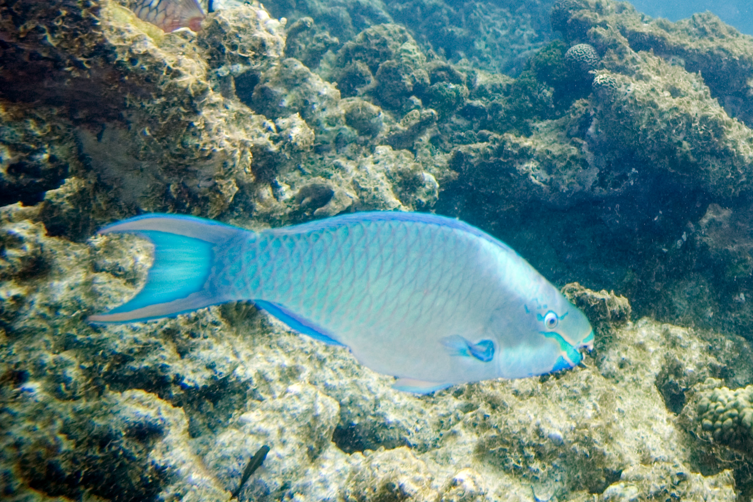 queen parrotfish Scarus vetula